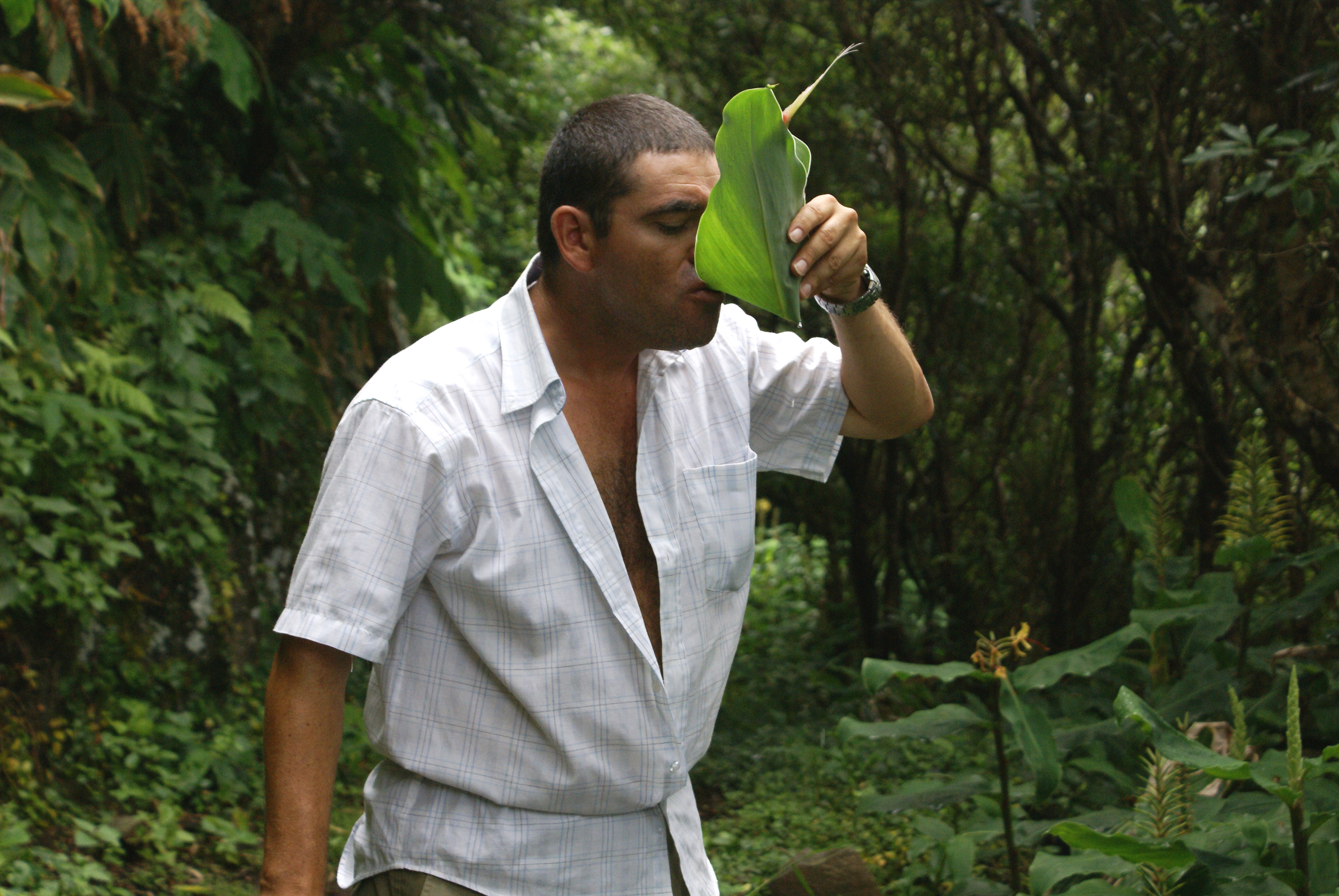 Fajã de Vasco Martins, forma tradicional de beber água usando uma folha de Hedychium gardnerianum, vulgarmente denominada por Conteira, Toledo, Velas, ilha de São Jorge